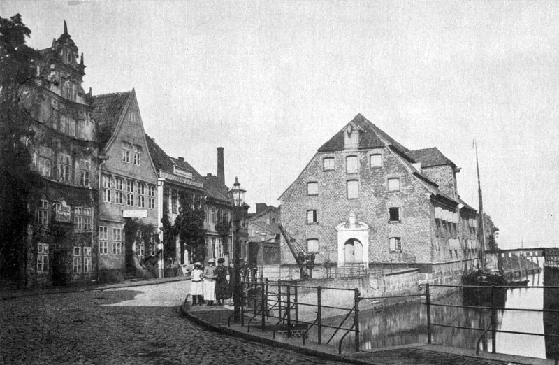 Provianthaus in Stade